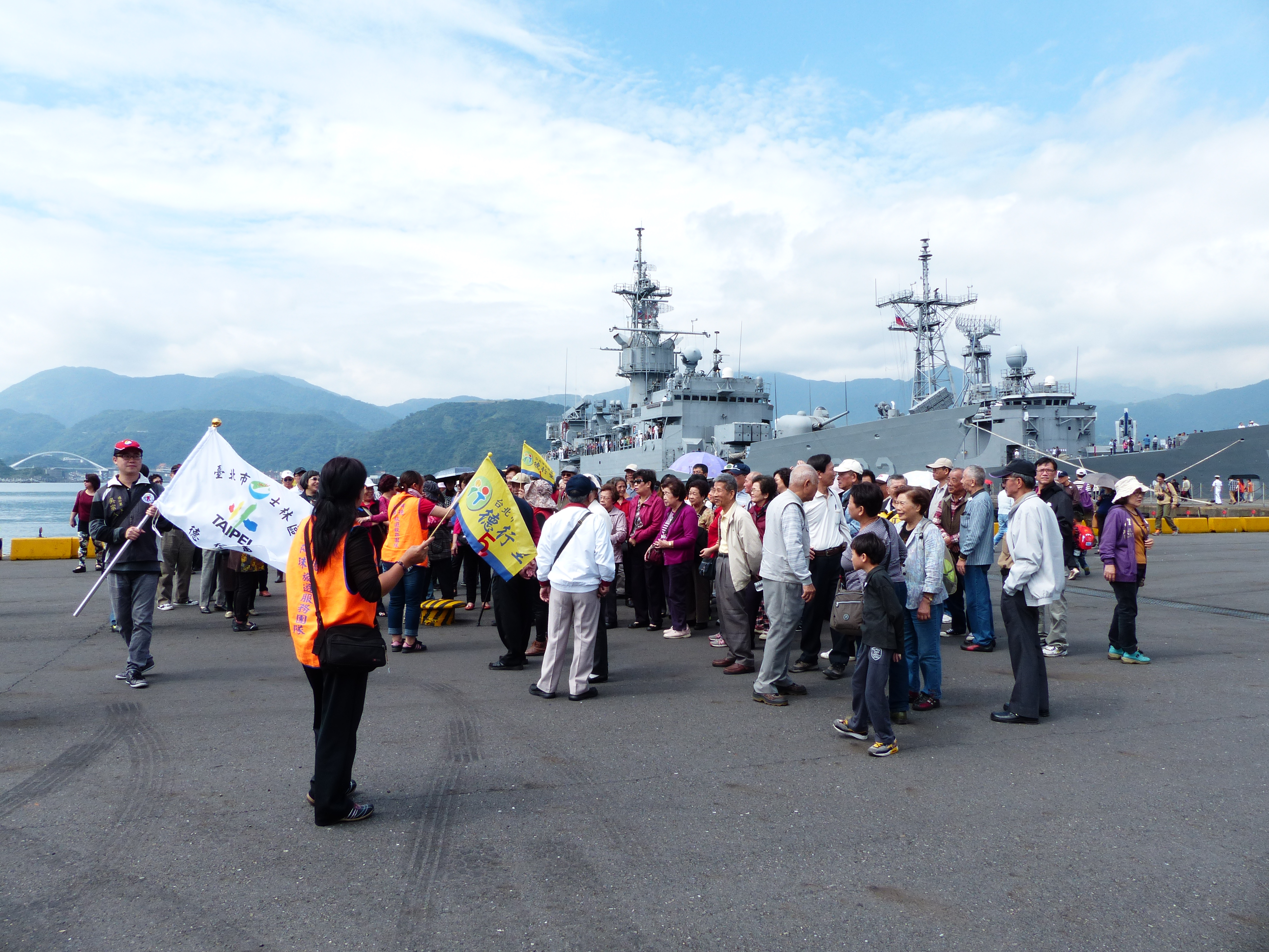 來自臺北市士林區德行里的旅遊團，在中正軍港11號碼頭集合。